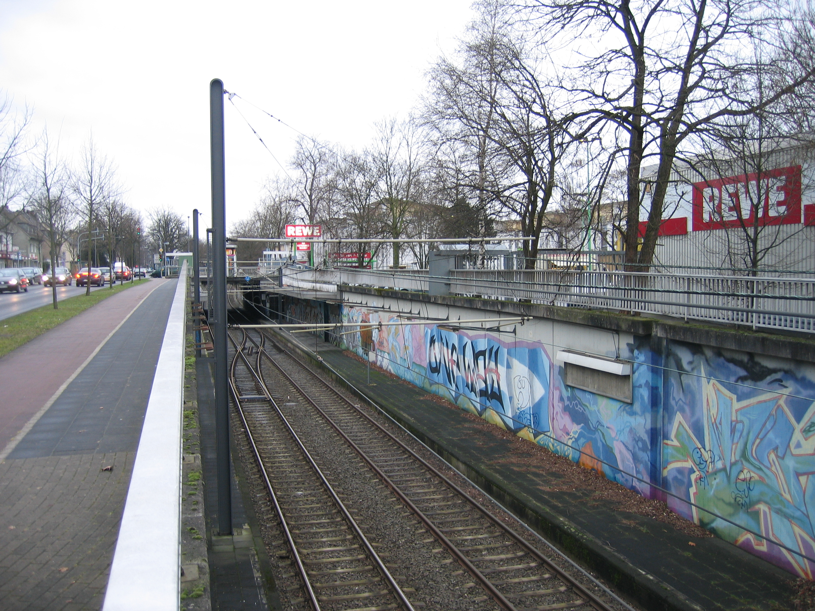 Ehemalige U-Bahn-Station Fixheider Weg der Stadtbahn Köln